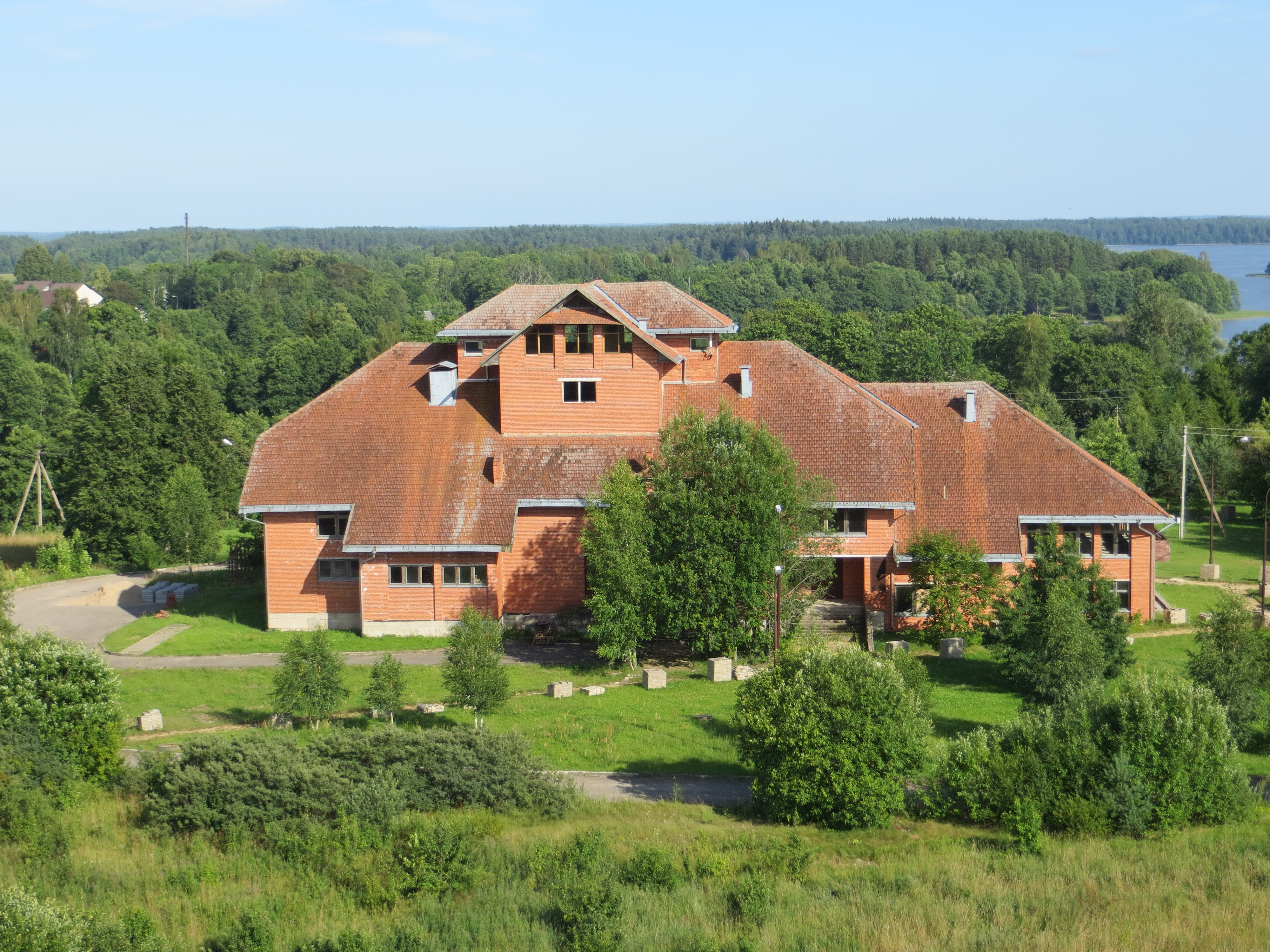 Linkmenys, Lithuania